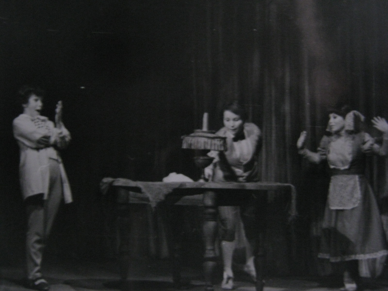 Сцена из спектакля «Житейские мелочи» по мотивам рассказов Антона Павловича Чехова (рассказ Детвора) в Челябинском государственном театре юных зрителей, режиссёр-постановщик Геннадий Егоров